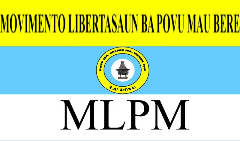 Tetun: Movimentu Libertasaun ba Povu Maubere